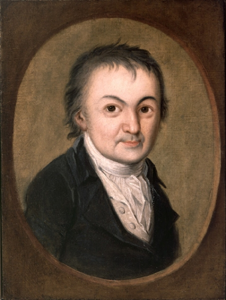 Eberhard Gmelin (1751–1809). Ölgemälde ohne Signatur, Justinus-Kerner-Verein Weinsberg